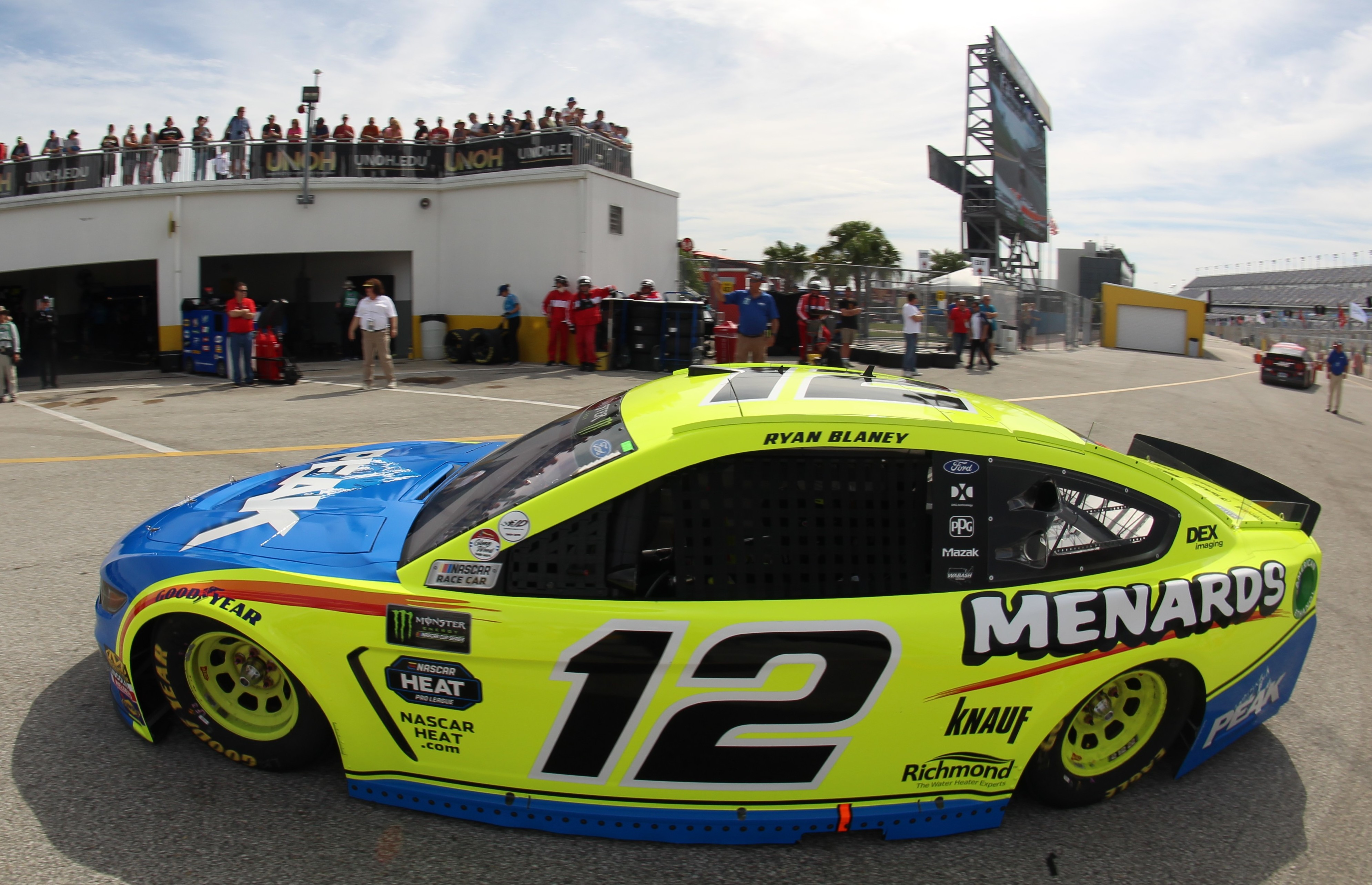 2019 Daytona 500